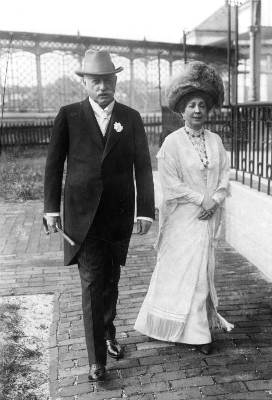 Fürst Bülow im Sterben. Der Altreichskanzler mit seiner Gattin vor 20 Jahren aufgenommen.